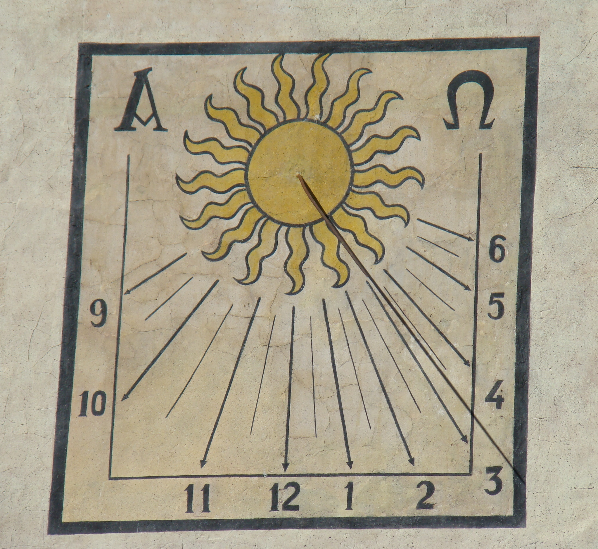 RI-53-0000198